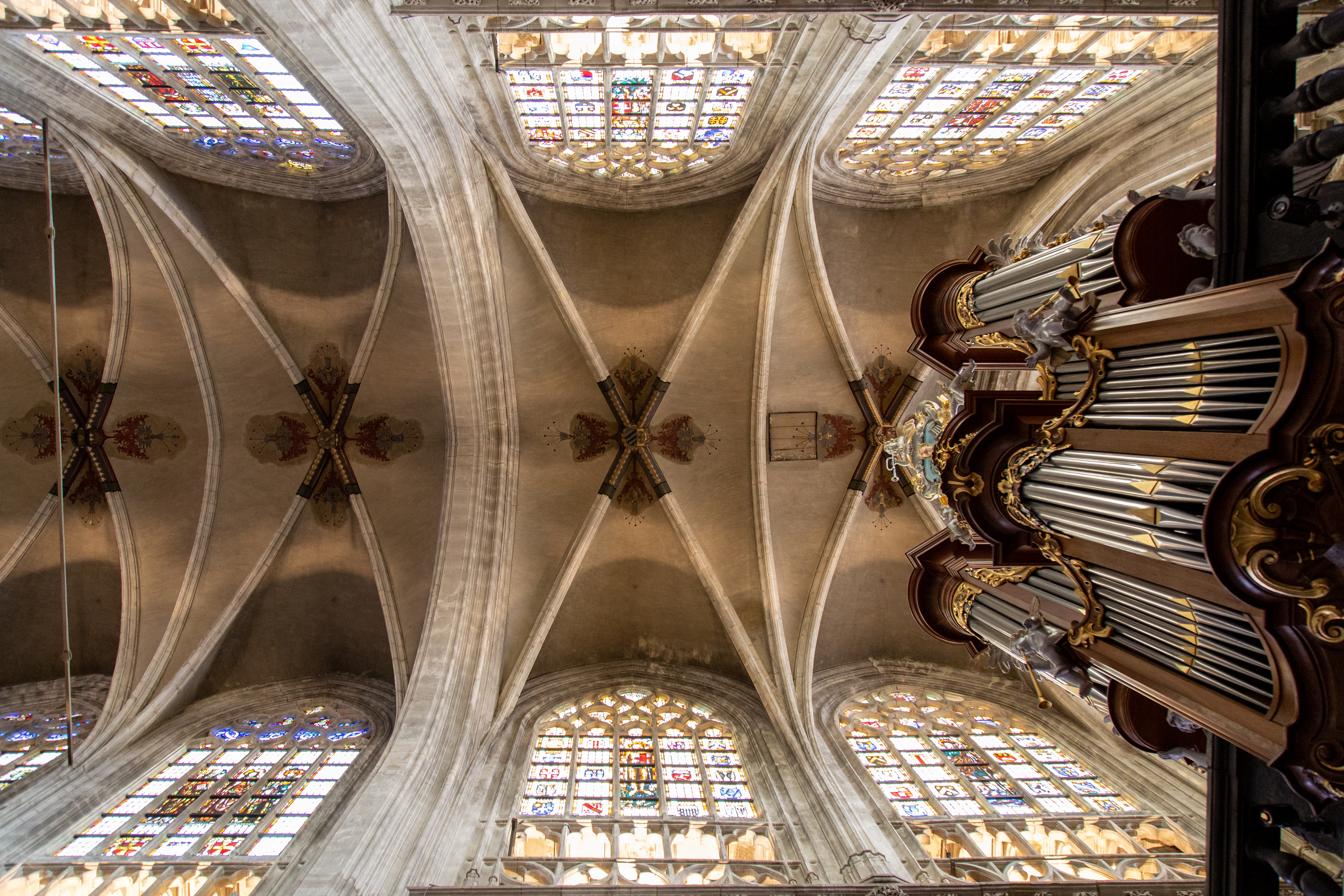 Plafond de l'église Notre-Dame du Sablon de Bruxelles This photo of immovable heritage has been taken in the Brussels Capital Region